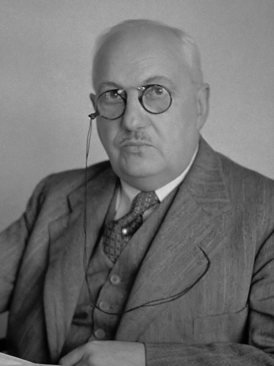 Jhr.Ir. O.C.A. van Lidth de Jeude maart 1942